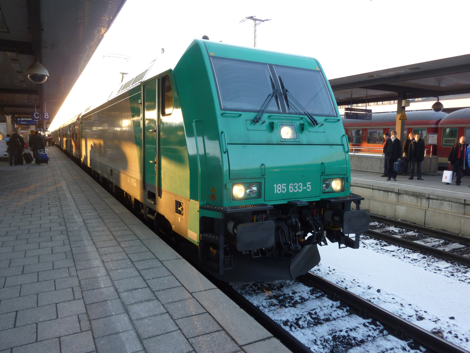 Alpha Trains 185-633 im S-Bahn-Vorlaufbetrieb in Nürnberg Hbf, als Ersatzzug für die noch nicht zugelassenenen Talent 2 Triebzüge.